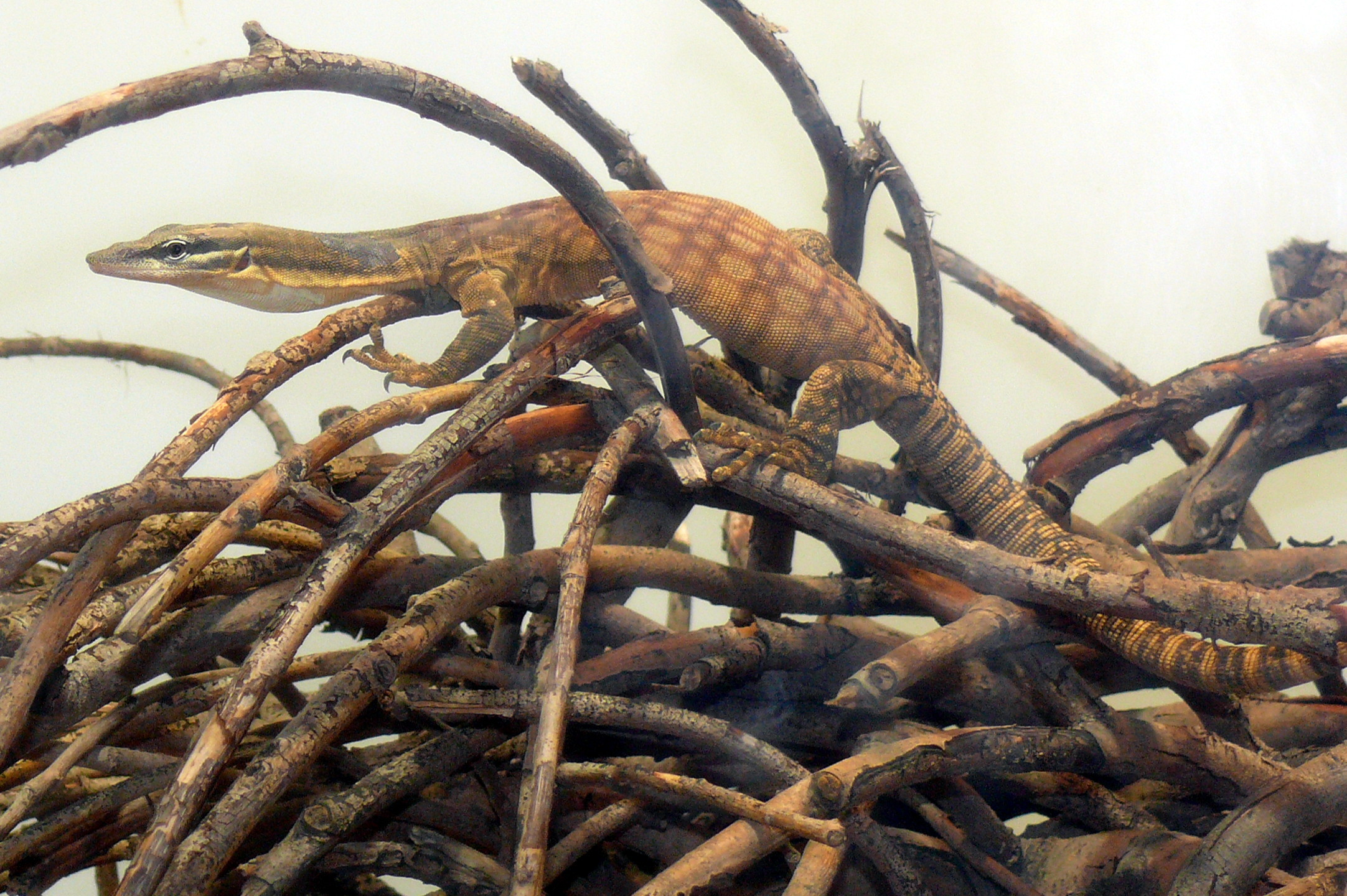 Kimberley-Felsenwaran (Varanus glauerti)